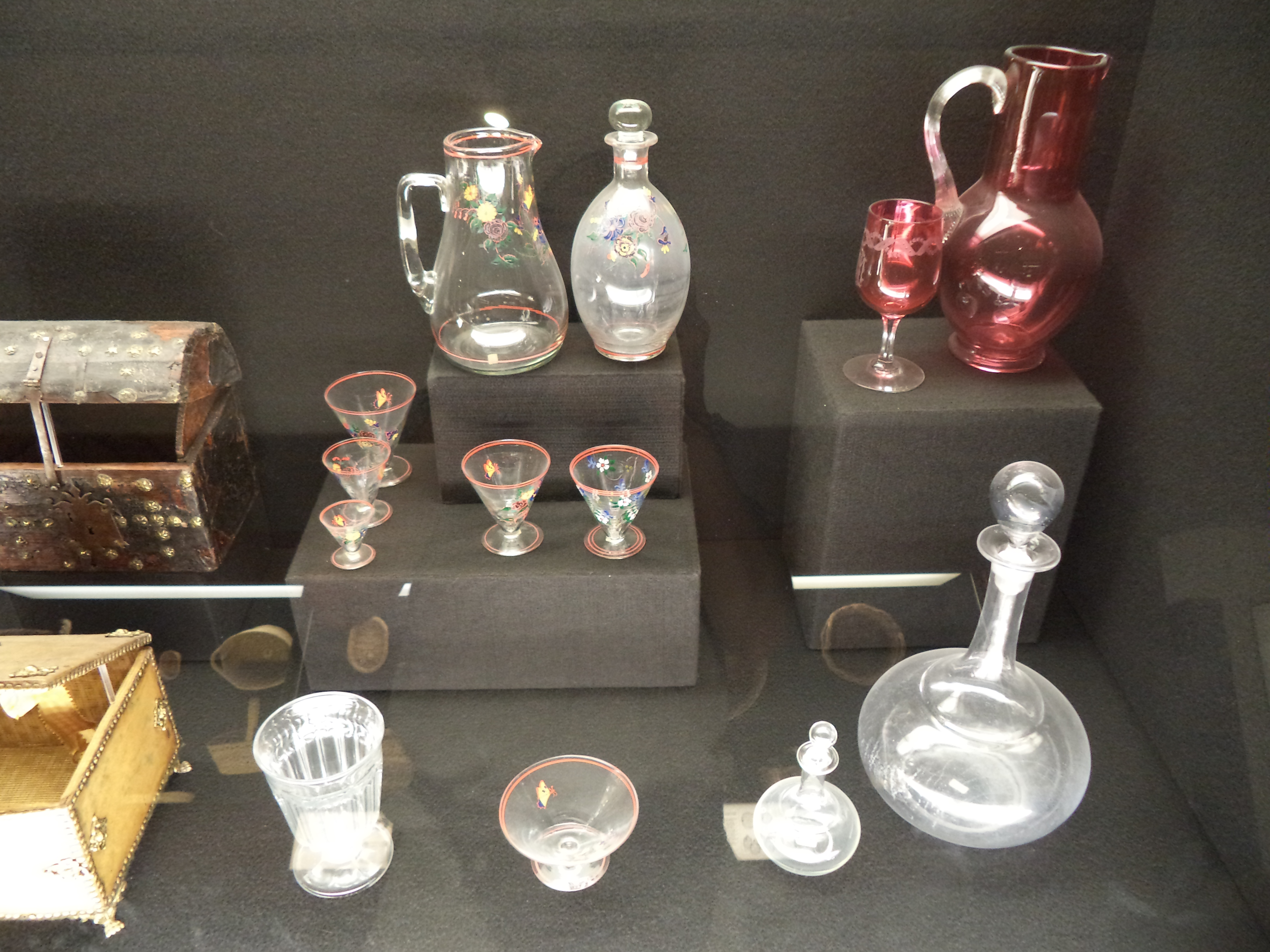 Copas, botellas y jarras de cristal. Museo de Artes y Costumbres Populares de Sevilla